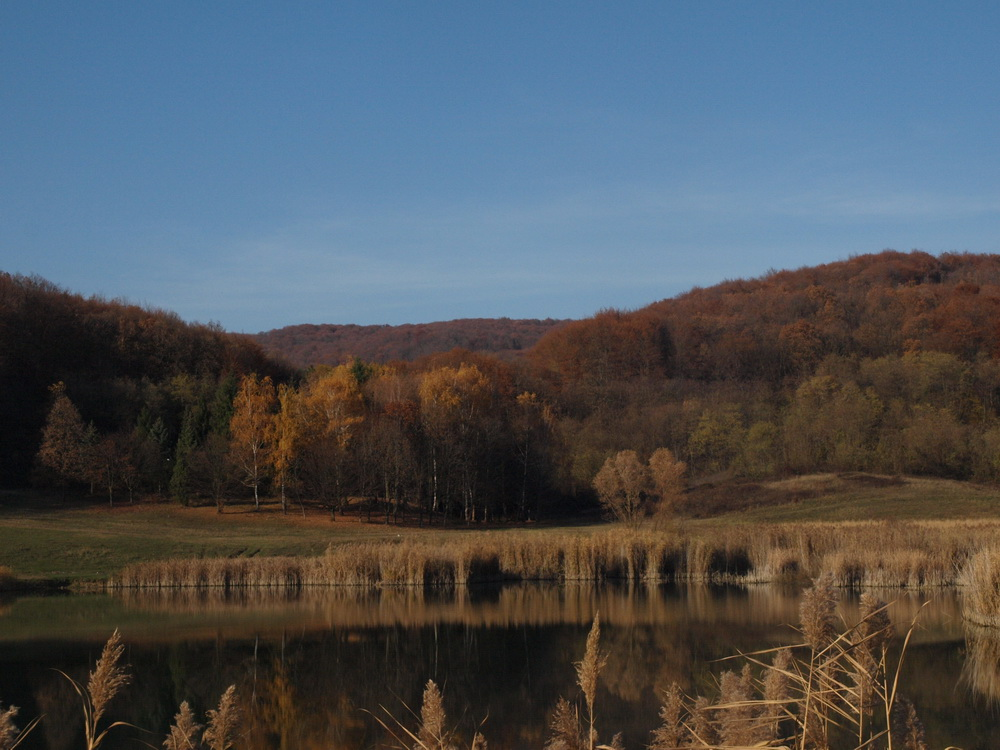 Ljeskove vode u općini Bukovlje, kraj Slavonskog Broda.